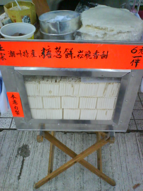 糖蔥餅